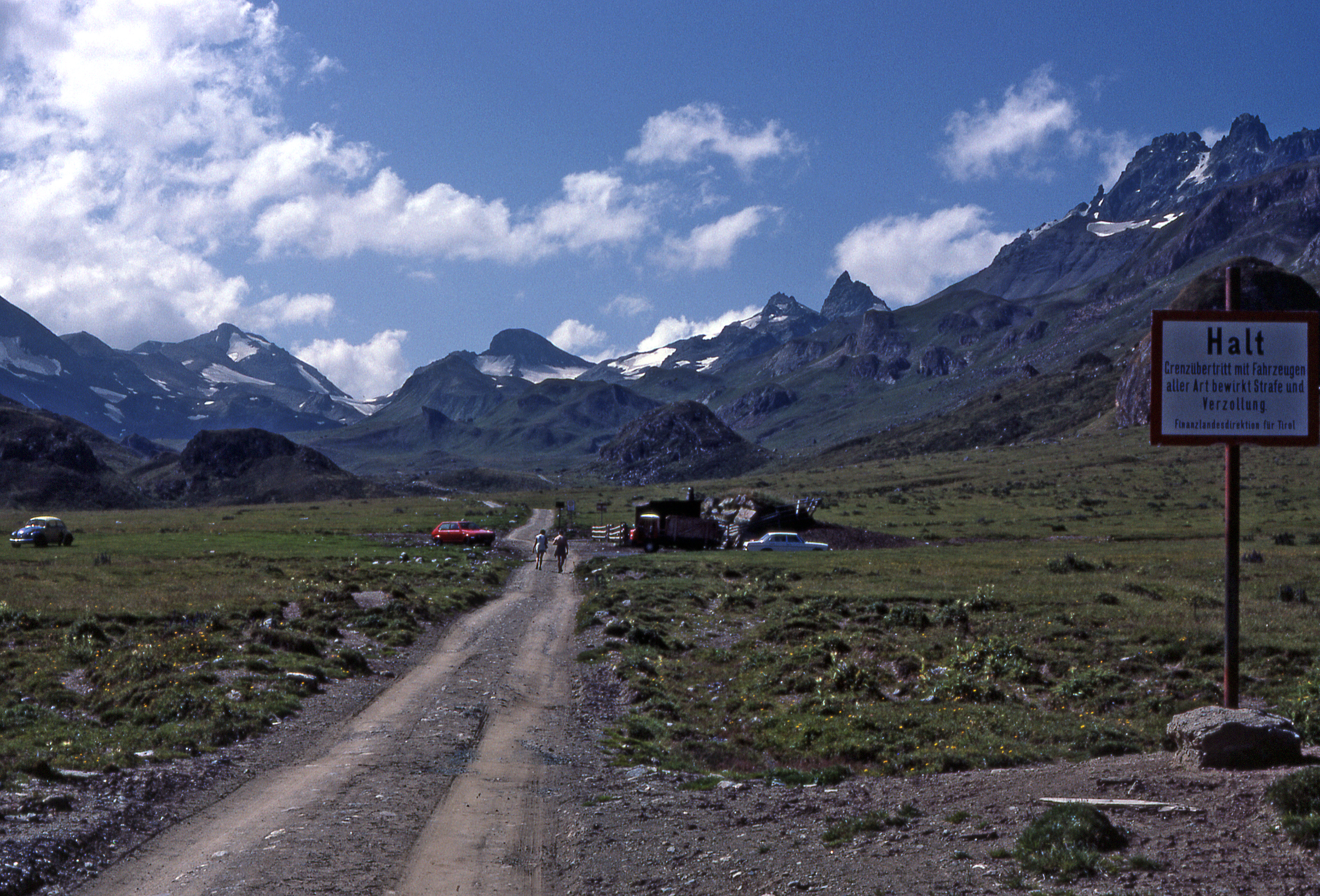 Silvretta, Fimbatal, Grenzstelle A/CH (1980)Gipfel bzw. Berge im Hintergrund (von links):Piz Davo Lais(3.027 m; nicht mehr ganz im Bild)Piz Tasna (3.180 m; Schneefeld unter dem Gipfel)Breite Krone bzw. Curuna Lada (3.079 m; nasenförmig)Krone (3.187 m; knapp links der Zahnspitze)Zahnspitze (3099 m; zahnförmig)Fluchthorn bzw. Piz Fenga (max. 3.399 m;ganz rechts)